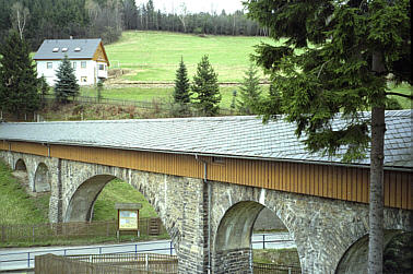 Wasserbrücke Krumhermersdorf, selbst fotografiert